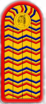 galón de grado de alférez del ejército chileno